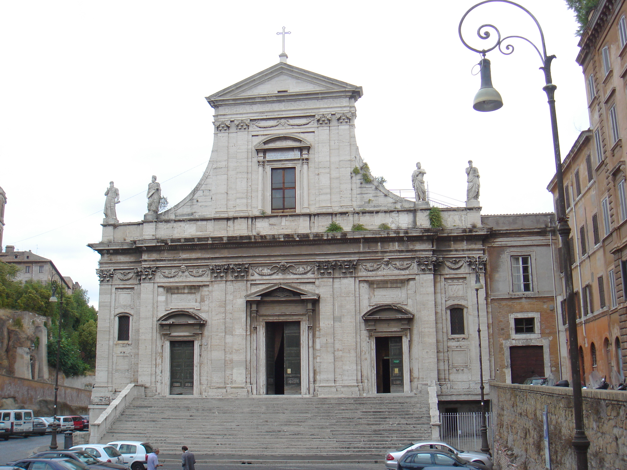 Roma, Santa Maria della Consolazione al Foro Romano